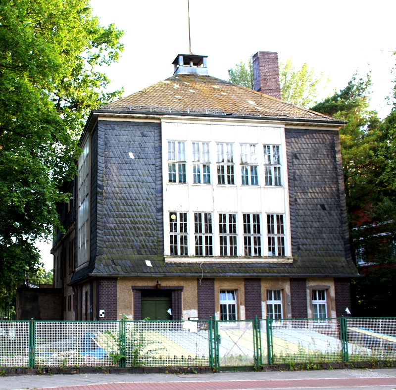 Denkmalgeschütztes Bootshaus Elektra in Berlin-Oberschöneweide, An der Wuhlheide 192-194, 12459 Berlin